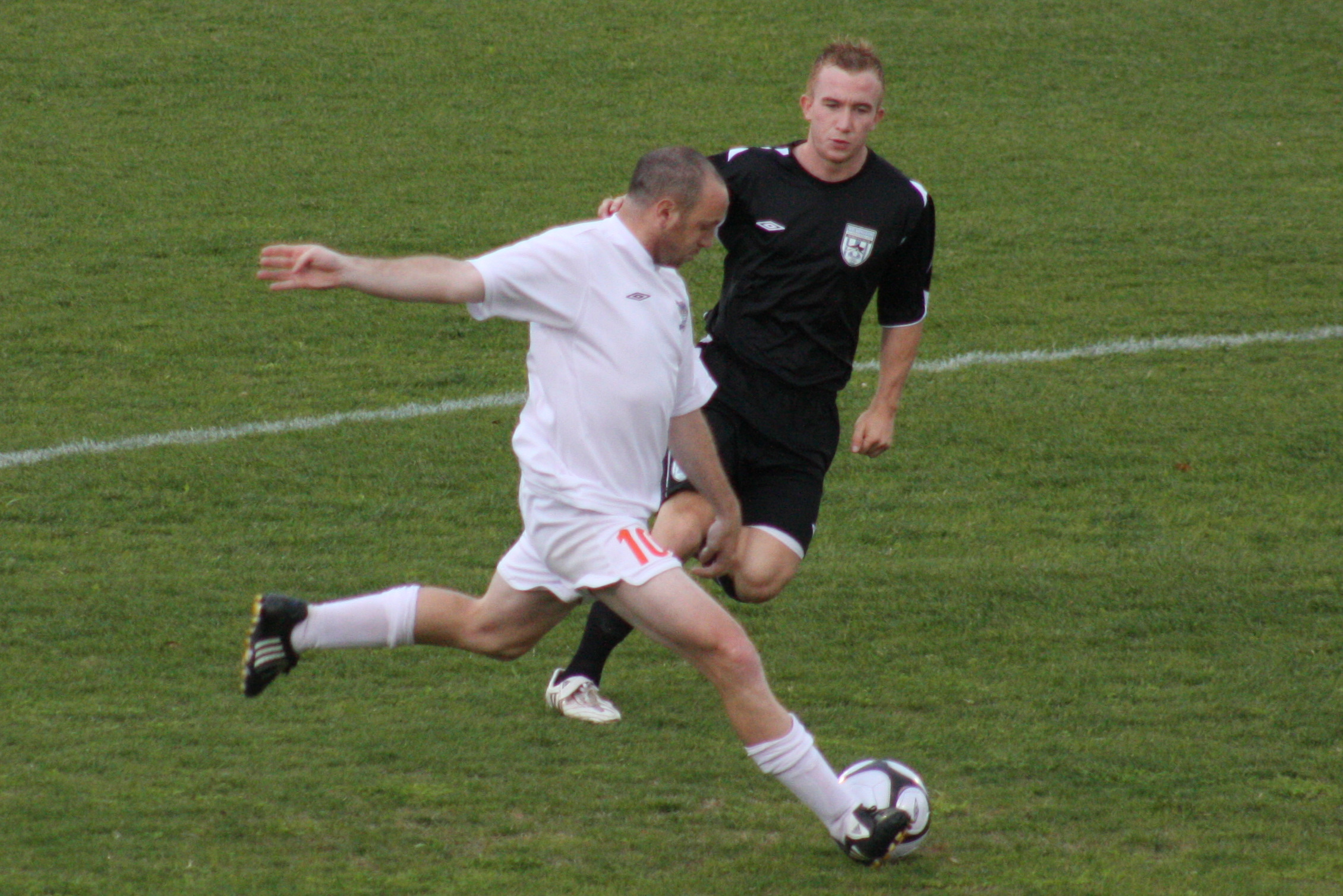 Brian Plotkin v. Jamie Watson